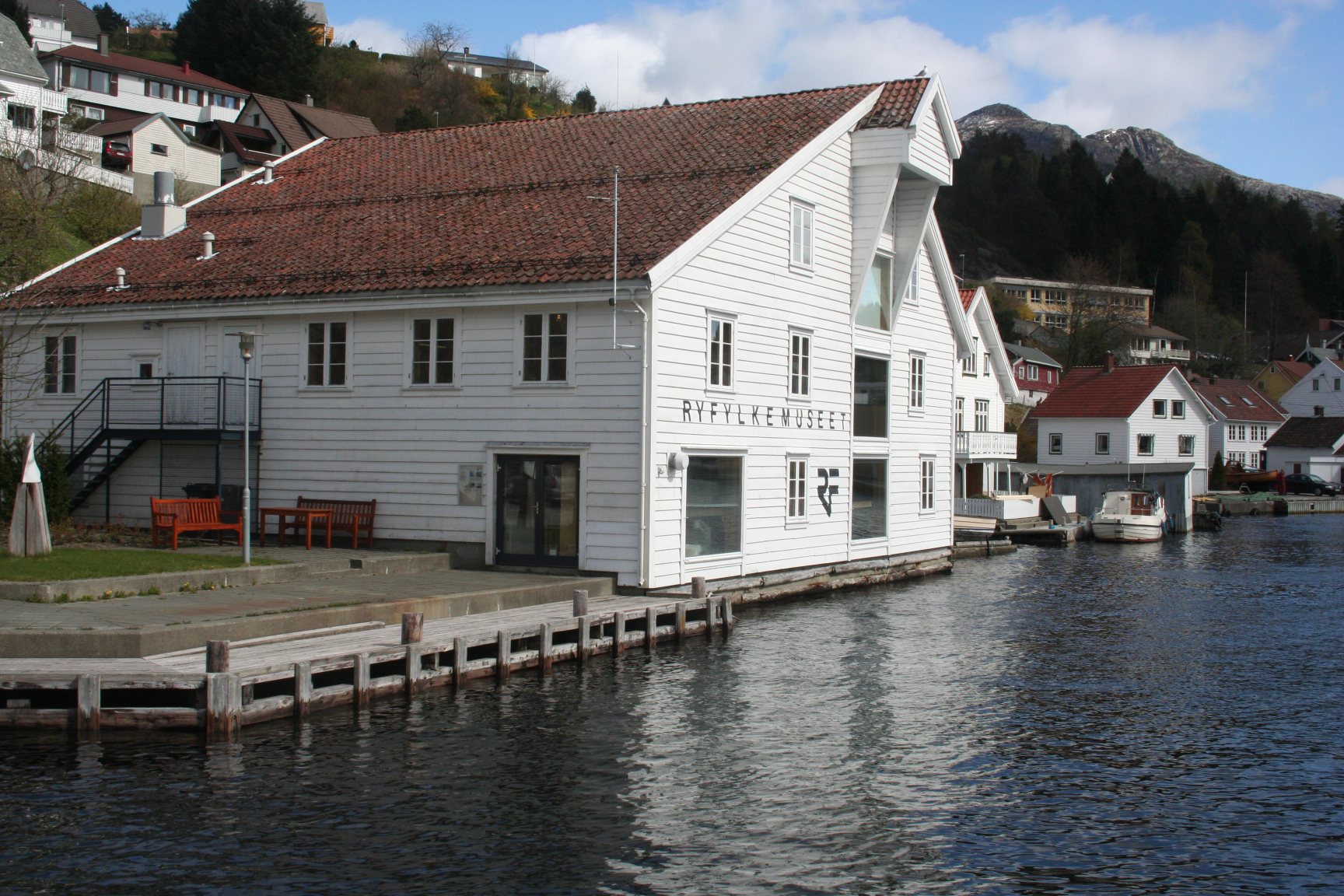 Ryfylkemuseum